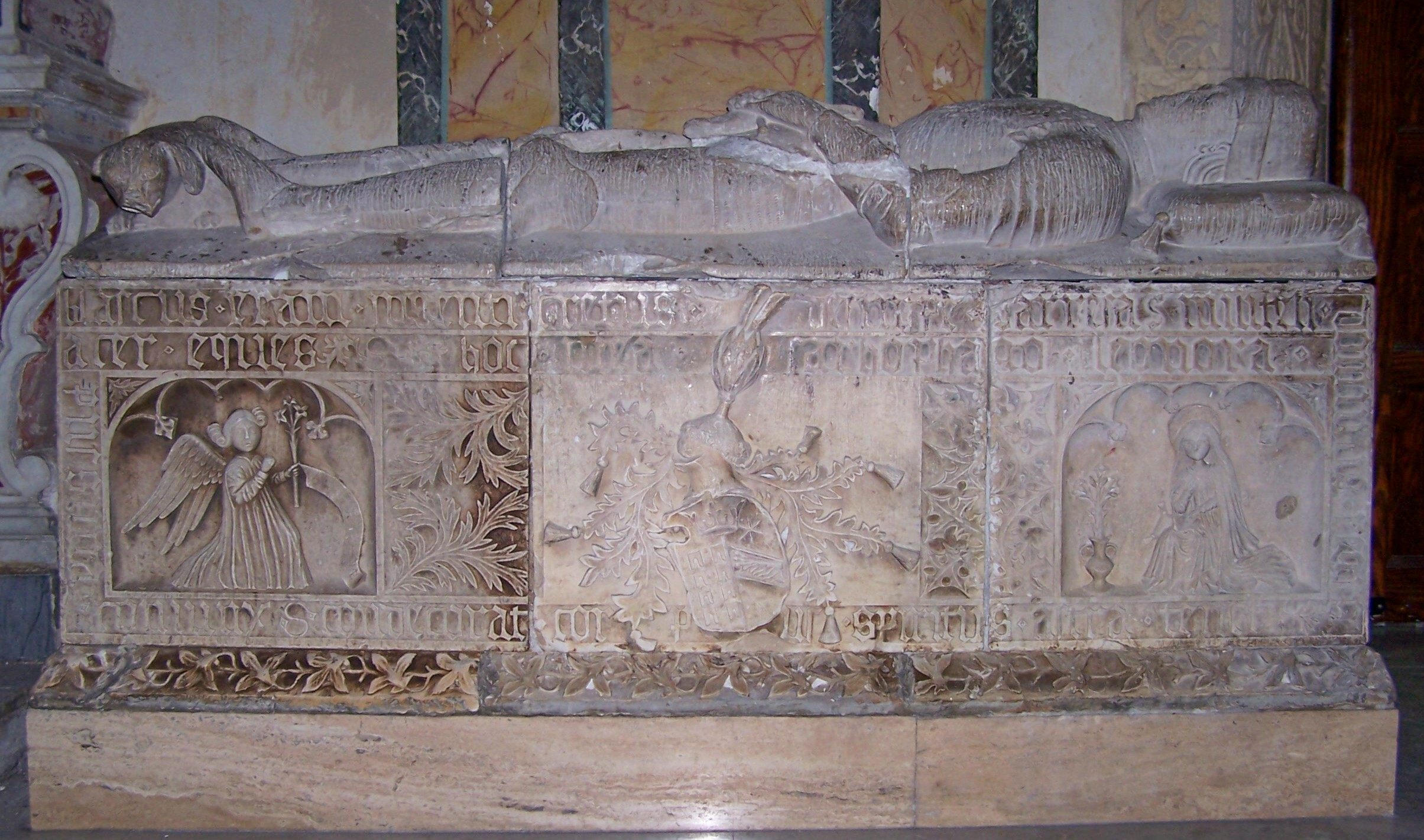 Sarcofago del barone di Militello Blasco II Barresi in S. Maria della Stella. Anno 1465.